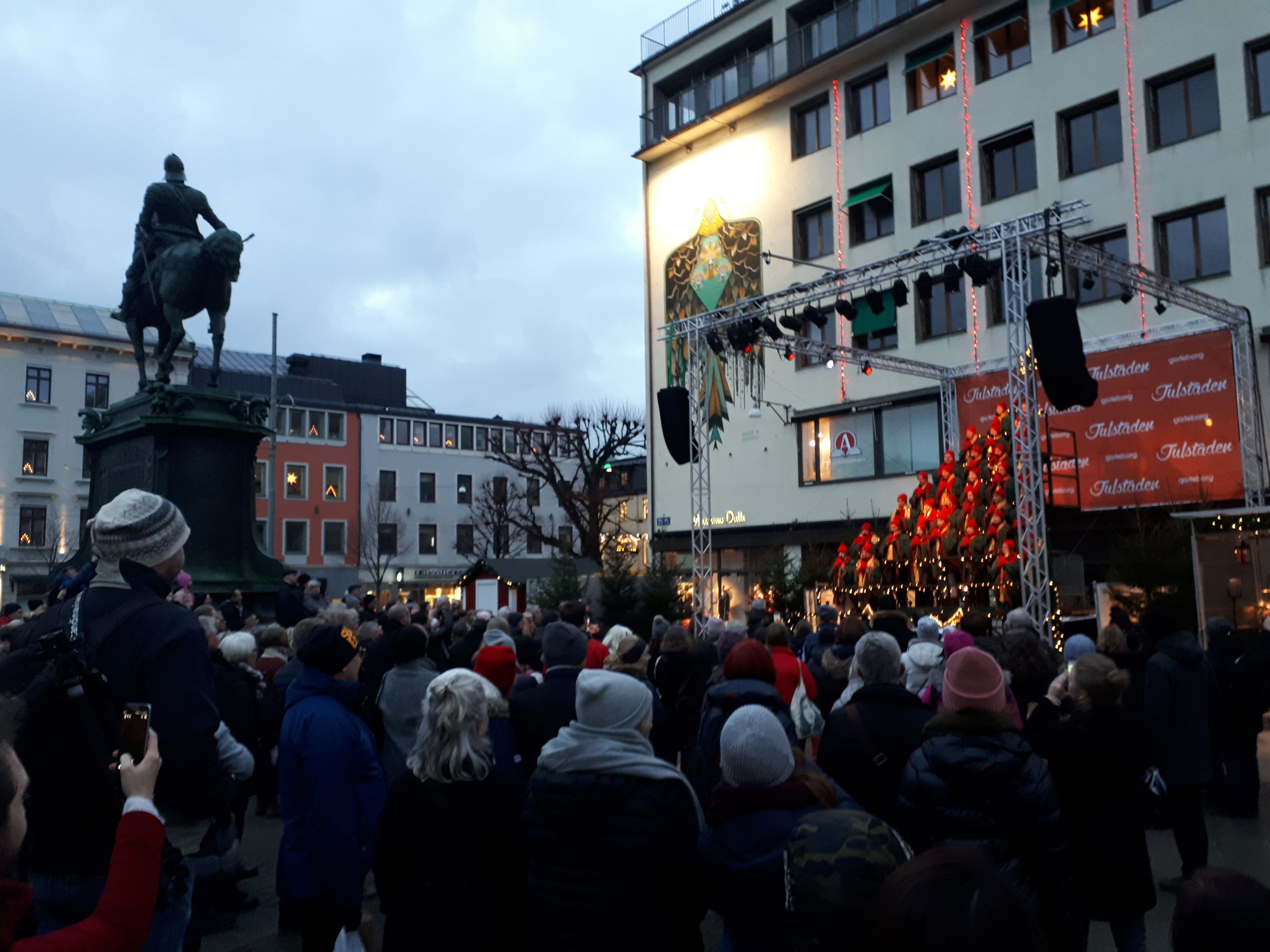 Den Sjungande Julgranen på Kungsportsplatsen i Göteborg den 1 december 2018 med Göteborgs Ungdomskör på denna bild. Under december månad fram till jul sjunger ungefär 4-5 olika körer varje dag. Evenemanget är en del av Julstaden Göteborg. Statyn Kopparmärra syns till vänster i bild.